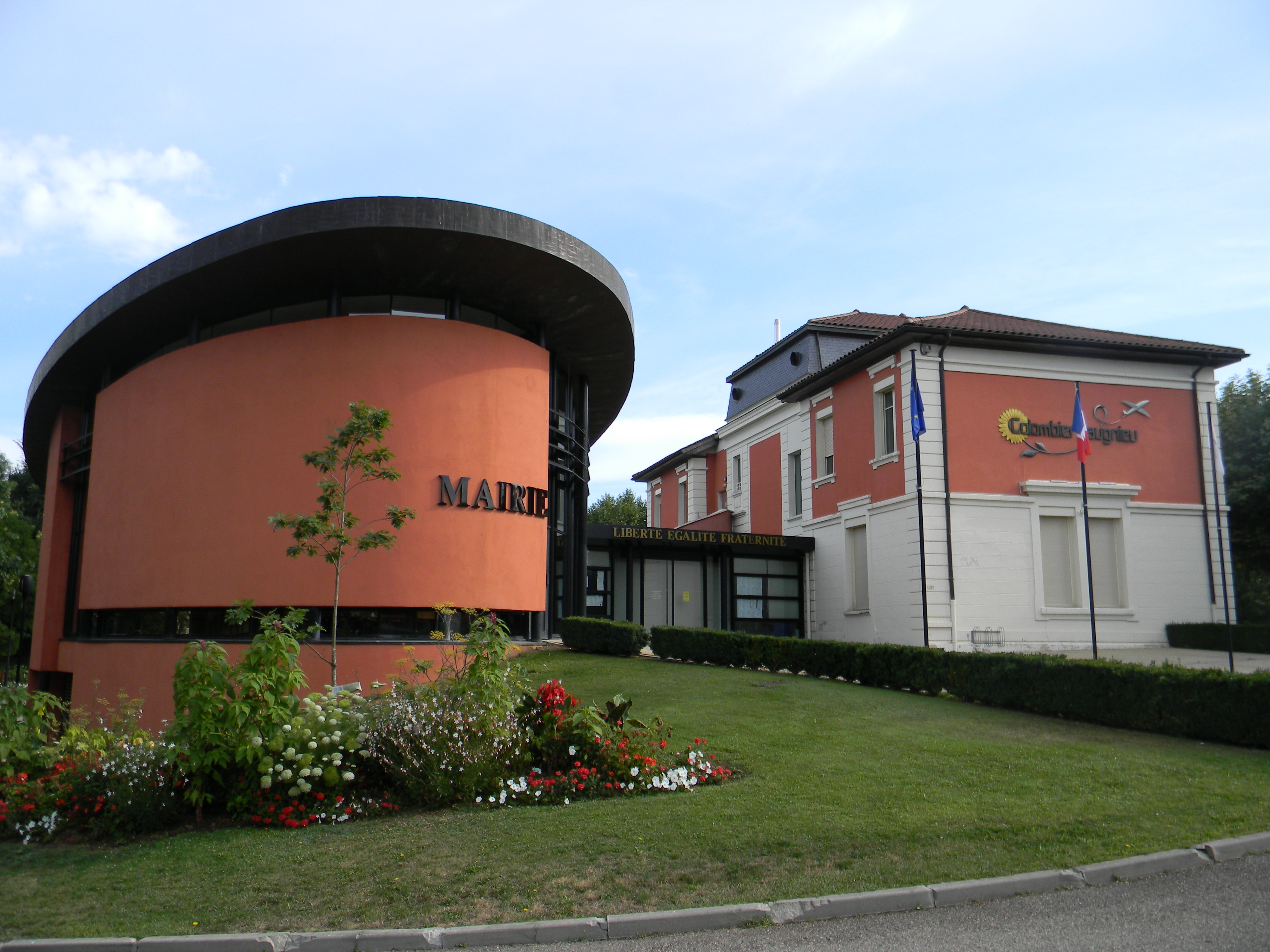 Mairie de Colombier-Saugnieu.